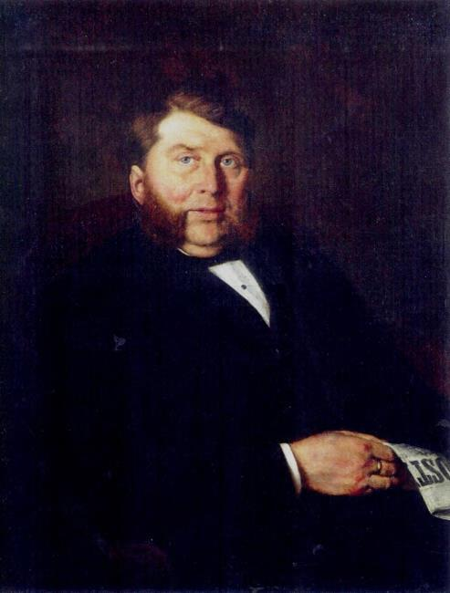 Portret van Johannes van 't Lindenhout (1837-1918) door Jan Hendrik Scheltema